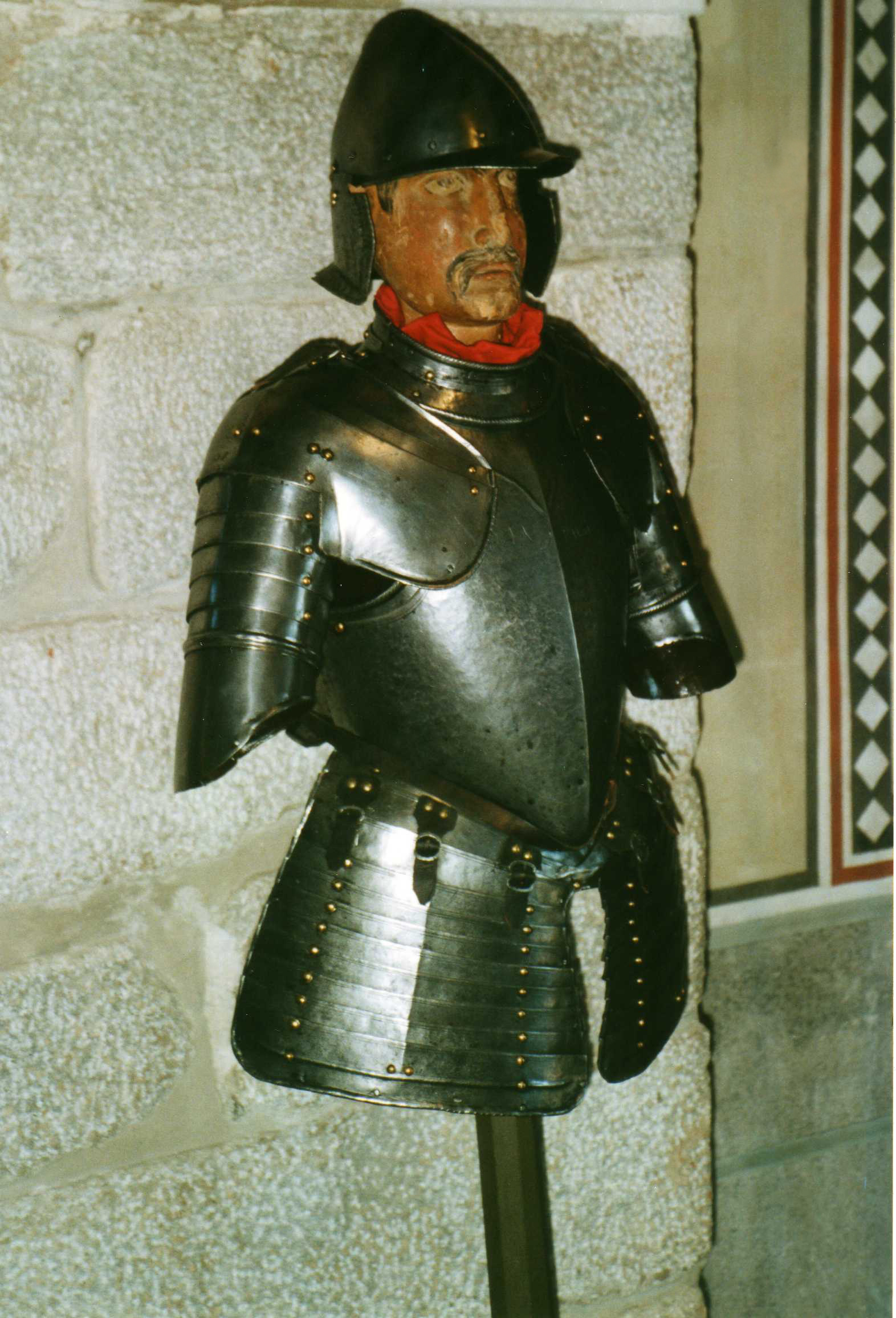 Autore Giorces. Armigero cinquecentesco.